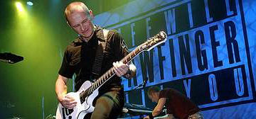 Baard_Torstensen in concert Arendal